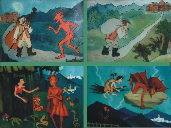 malowane na szkle,ze zbiorów klasztoru cystersów, za zgodą, reprodukcja: jadwiga